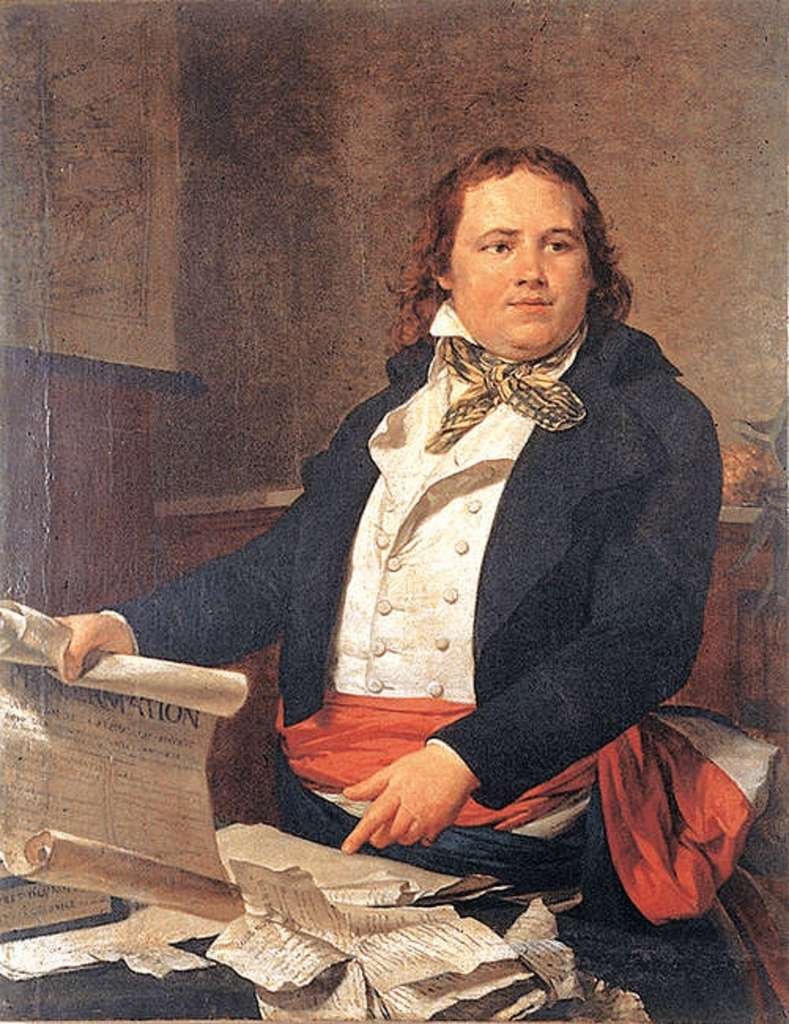 Portrait of Léger-Félicité Sonthonax (1763-1813)